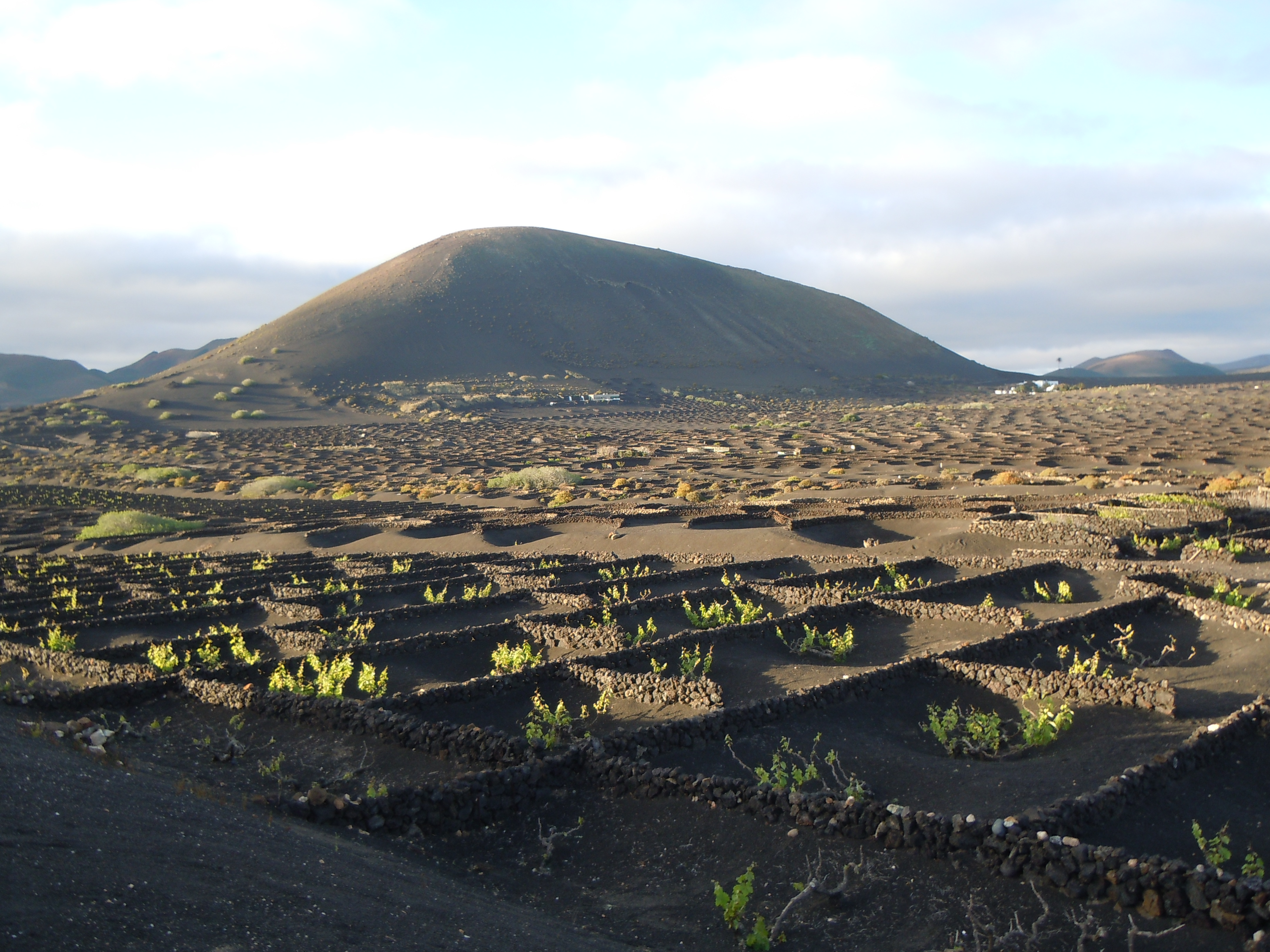 Montaña Diama depuis Bodegas de la Geria, Lanzarote